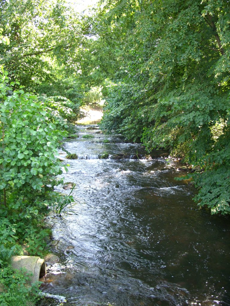 Wallensteingraben in Dorf Mecklenburg, Germany